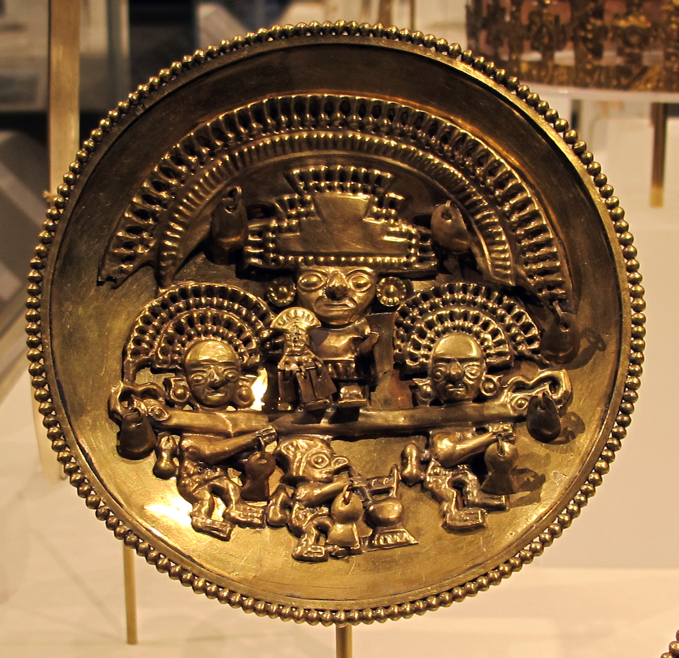 Pre-Columbian jewellery in the Metropolitan Museum of Art